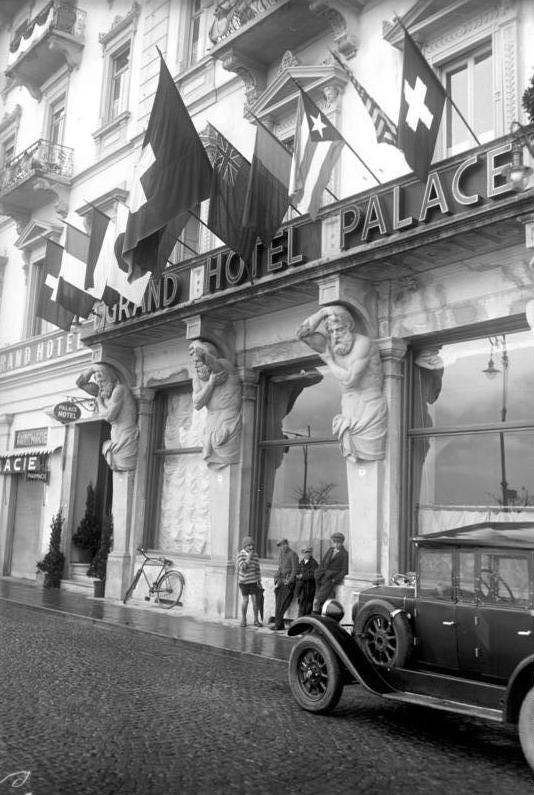 Erste Aufnahmen von der Völkerbundskonferenz in Lugano/Schweiz - unseres nach dort entsandten Sonder-Bild-Berichterstatters! Die Flaggen der teilnehmenden Nationen am Grand Hotel Palace, dem Sitz der deutschen und englischen Völkerbunds-Deligation.